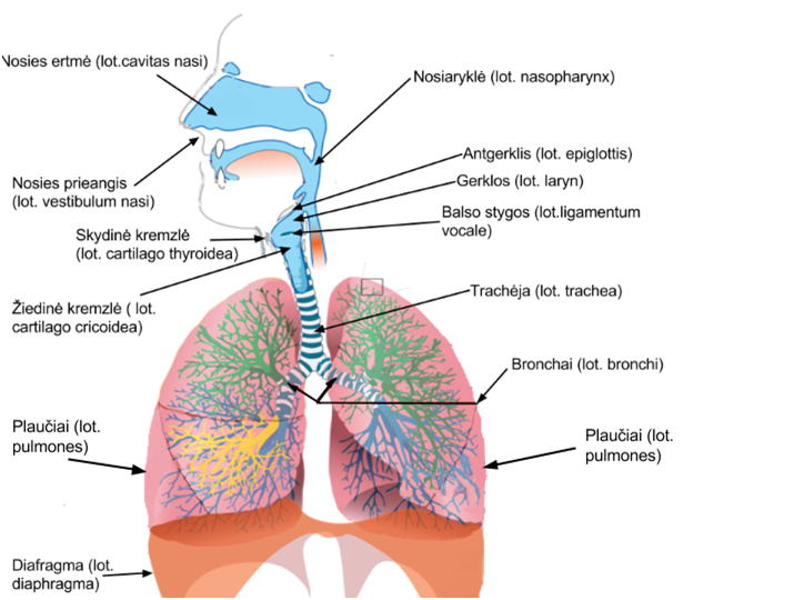 Kvėpavimo sistema